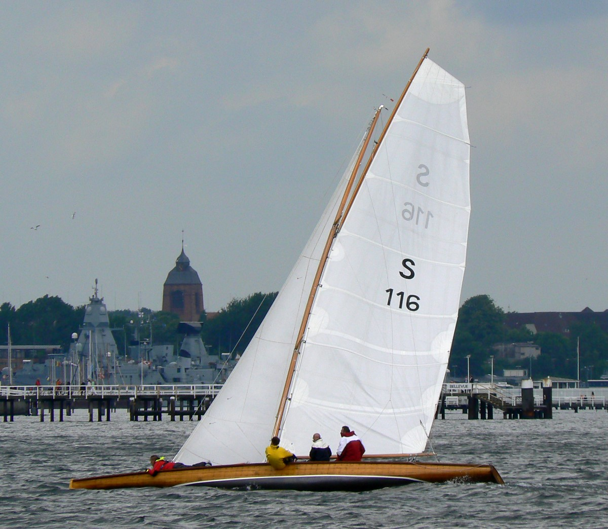 Segelboot der Bootsklasse Sonderklasse auf der Kieler Woche 2007.